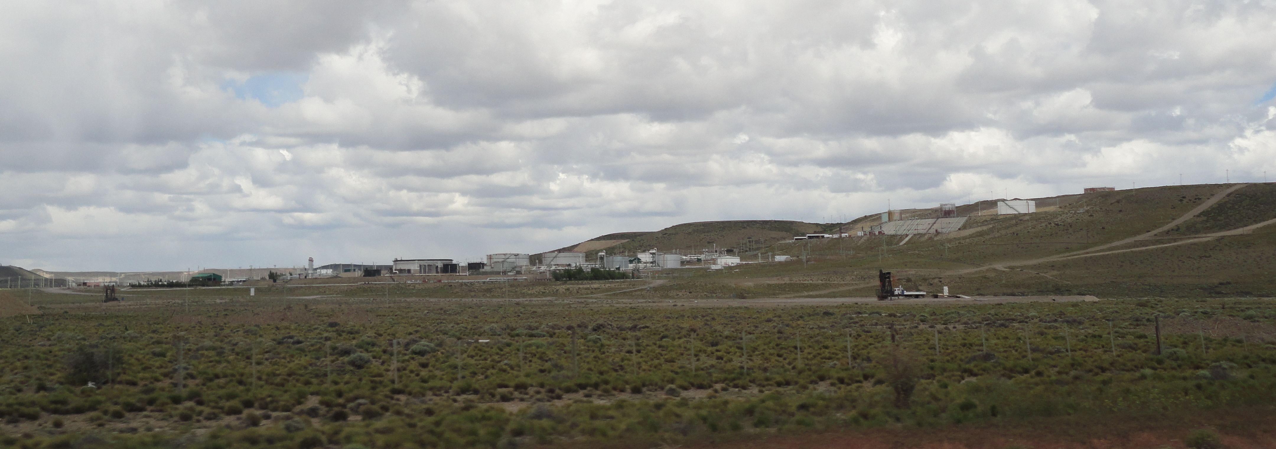 Vista del yacimiento desde la ruta 26